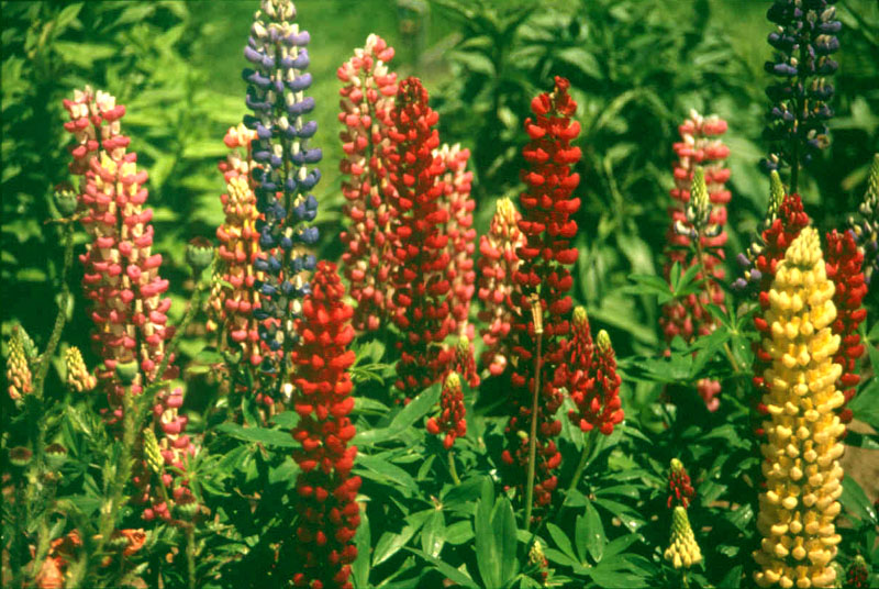 Lupinus